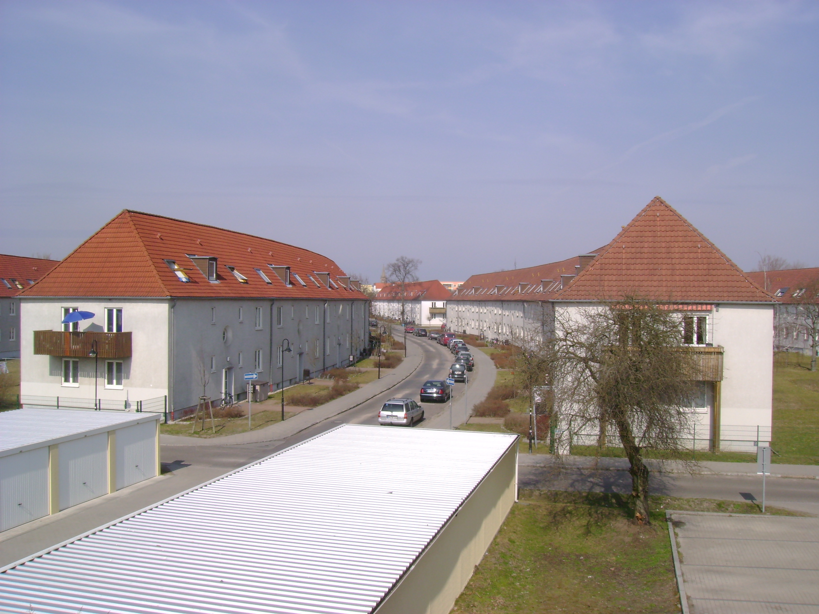 Hammer Straße / Friedrich-Engels-Straße in der Wohnsiedlung "Weiße Stadt" in Oranienburg. Als die Werksiedlung der Heinkel-Werke 1937 bis 1938 entstand, hießen die Straßen noch Immelmannstraße / Boelckestraße.